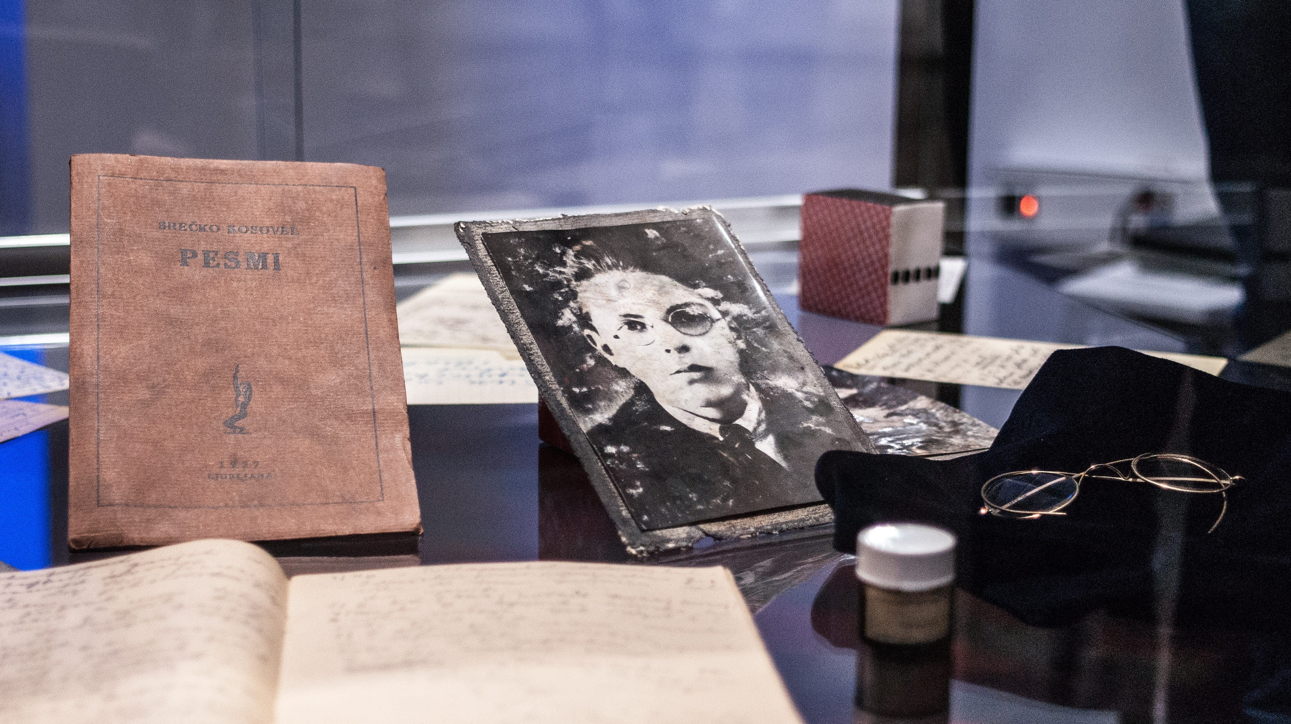 Spominska soba Srečka Kosovela v Sežani